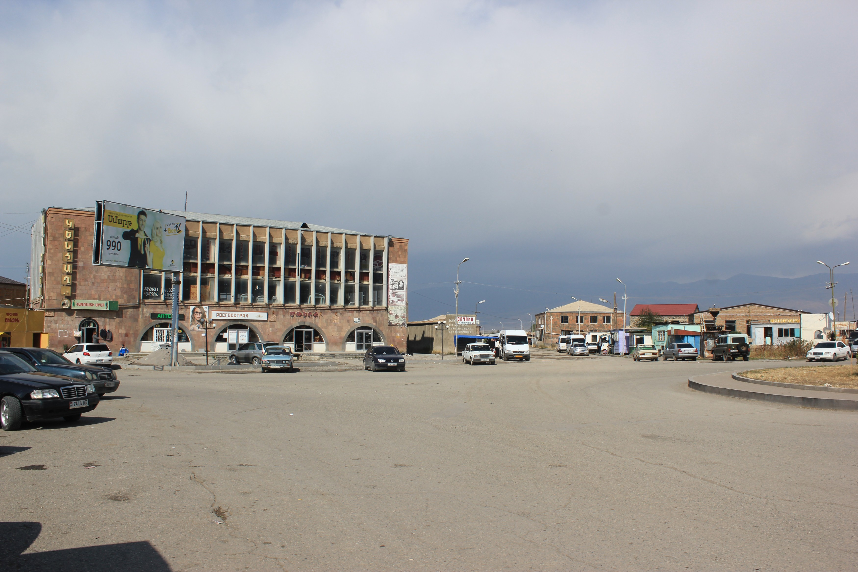 In Wardenis, Armenien.